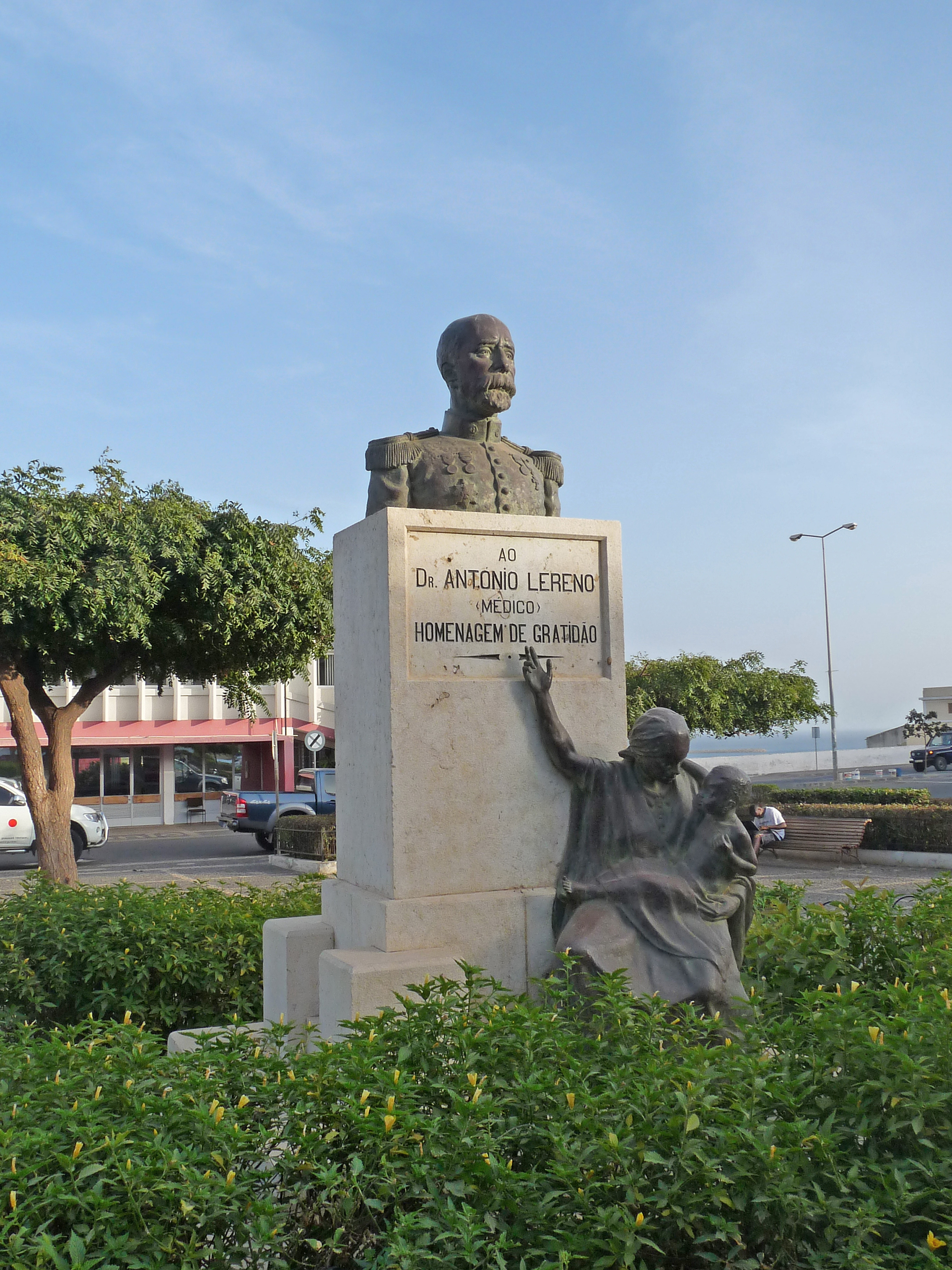 Praia (Cap-Vert) : monument à la mémoire du Dr. António Lereno